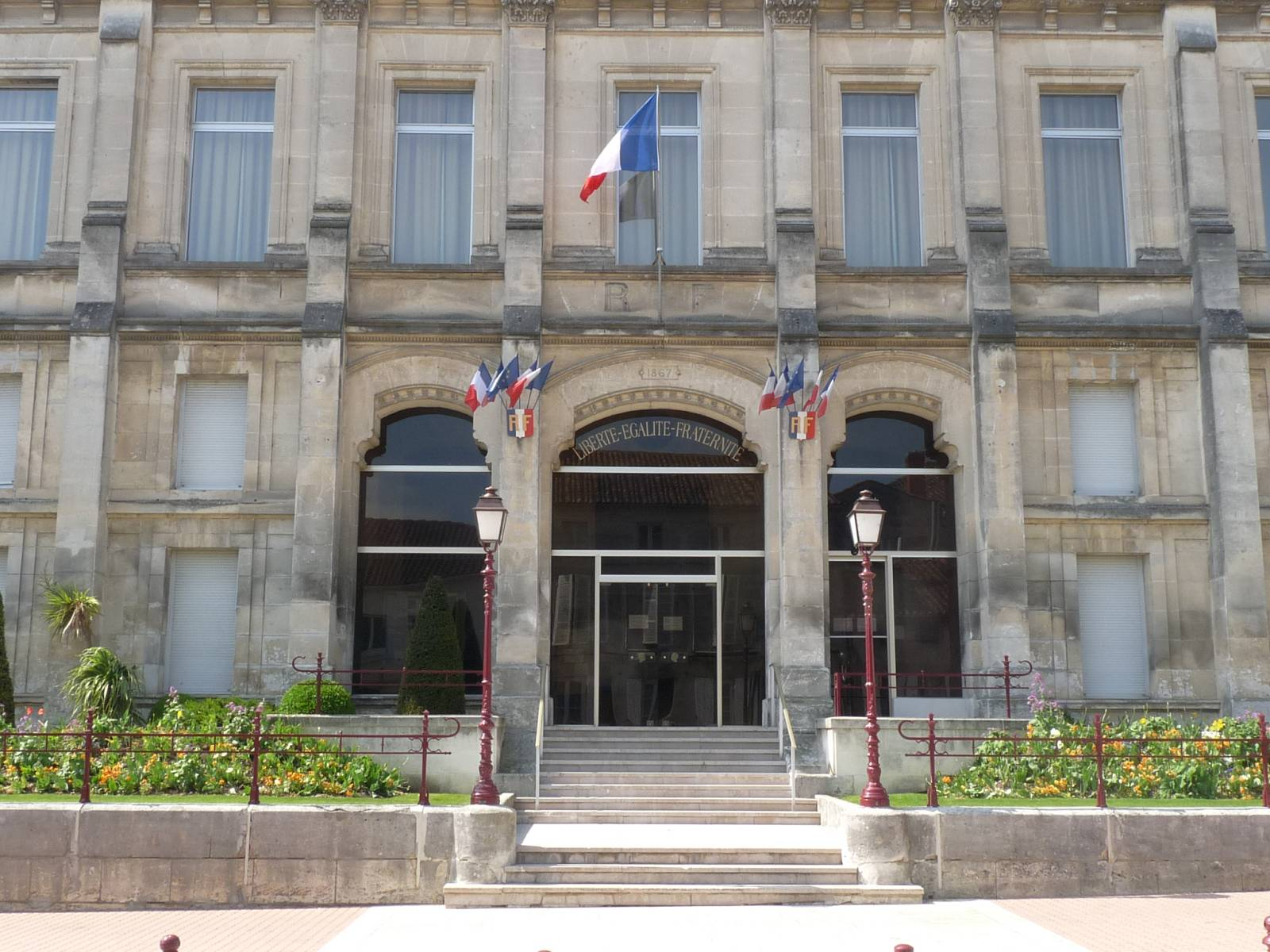 Hôtel de ville de Jarnac, Charente, France